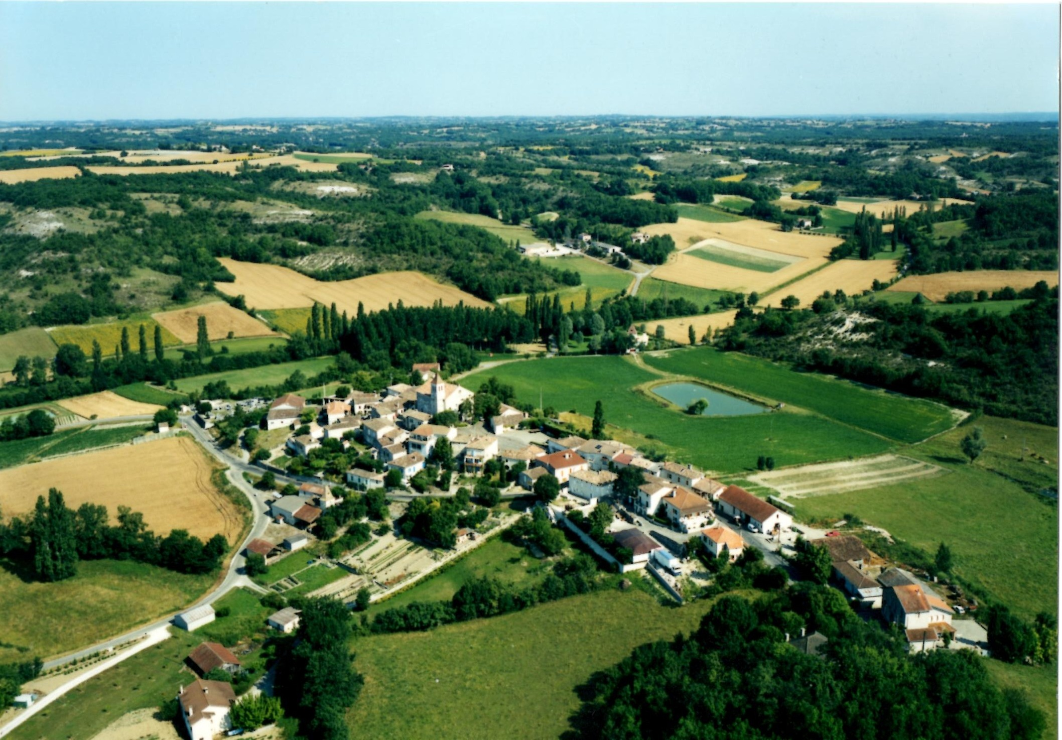 Village de St Paul de Loubressac (46)